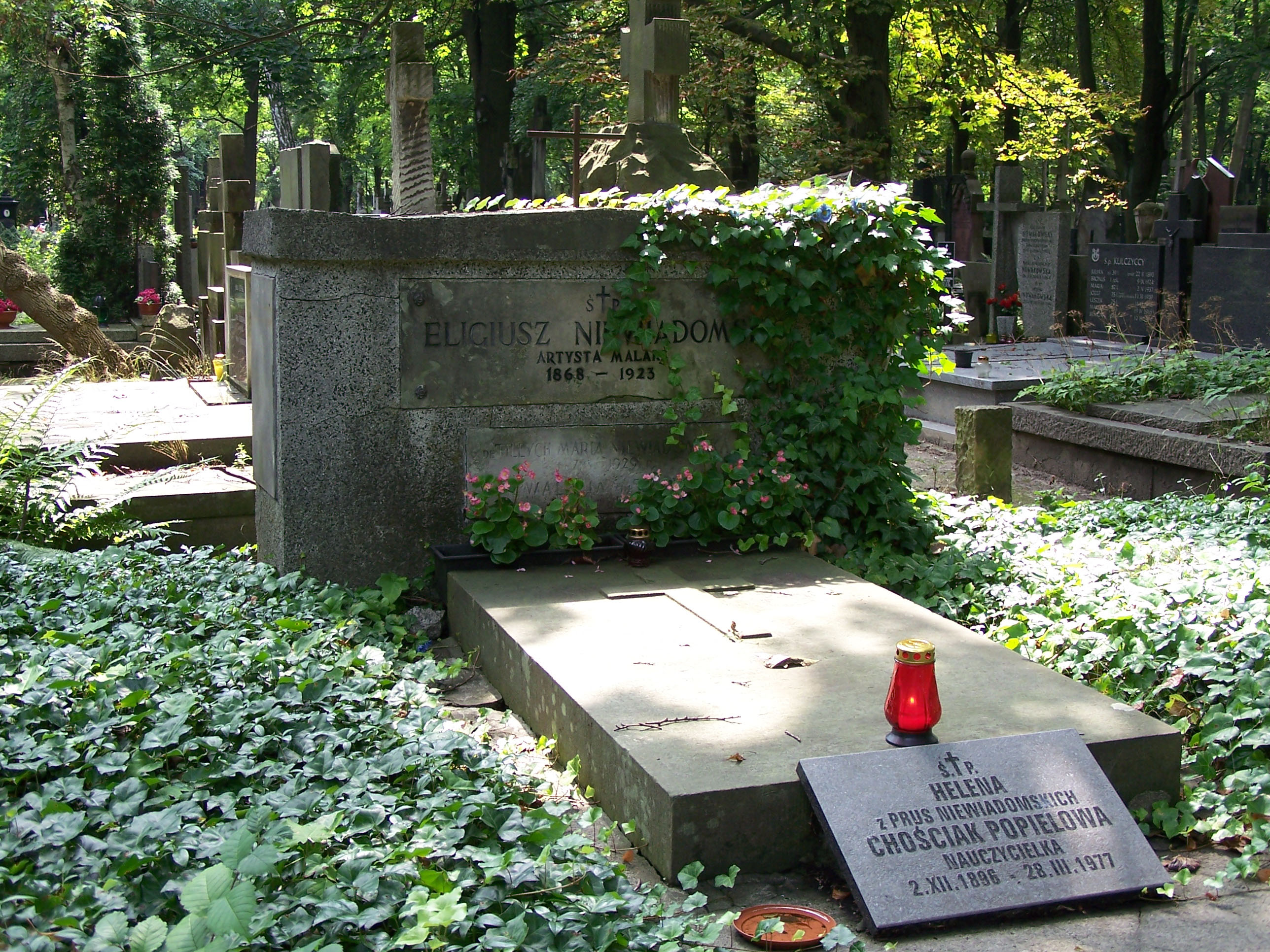 Grave of painter Eligiusz Niewiadomski at Powązki Cemetery in Warsaw, Poland